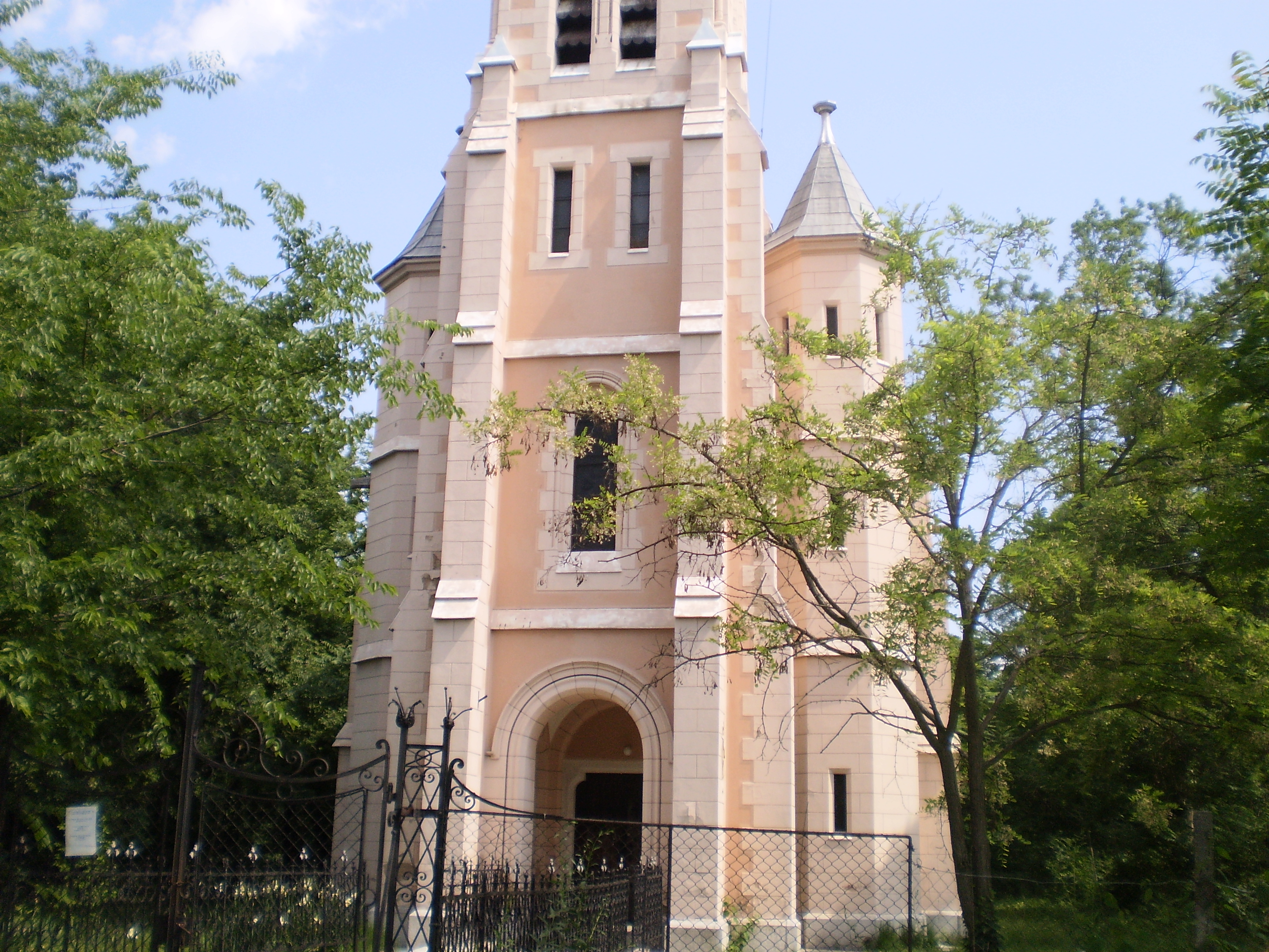 A nagymágocsi Szent Alajos római katolikus templom bejárata.